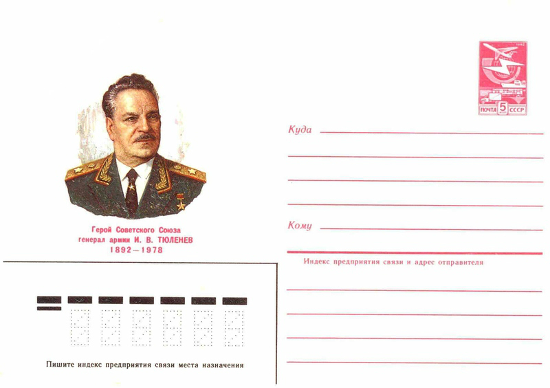 Художественные маркированные конверты 1984 года.